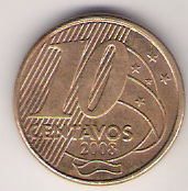 Frente da moeda de 10 centavos da segunda geração. Cunhada em 2008. This graphic was created with GIMP.